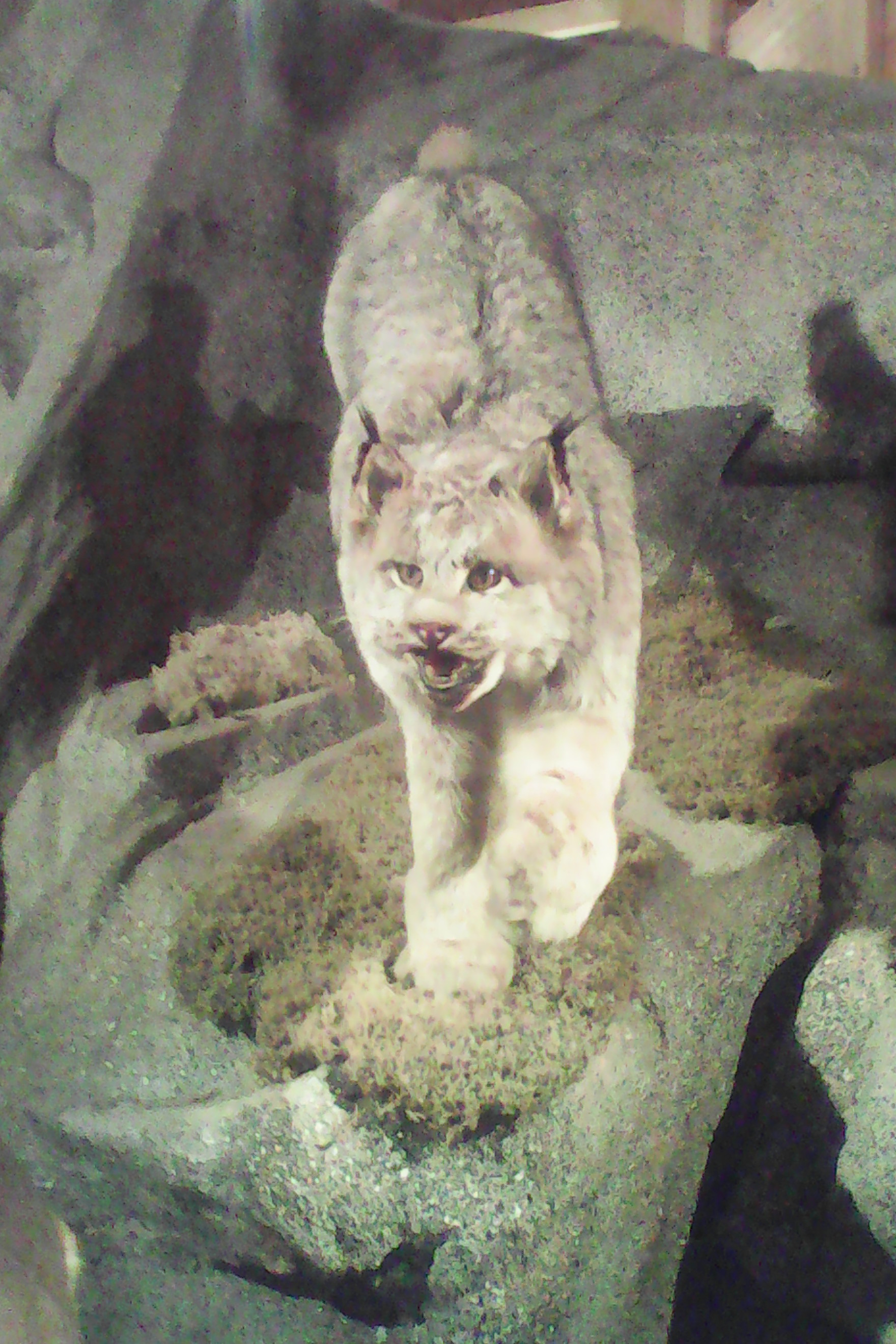 Lynx en attaque